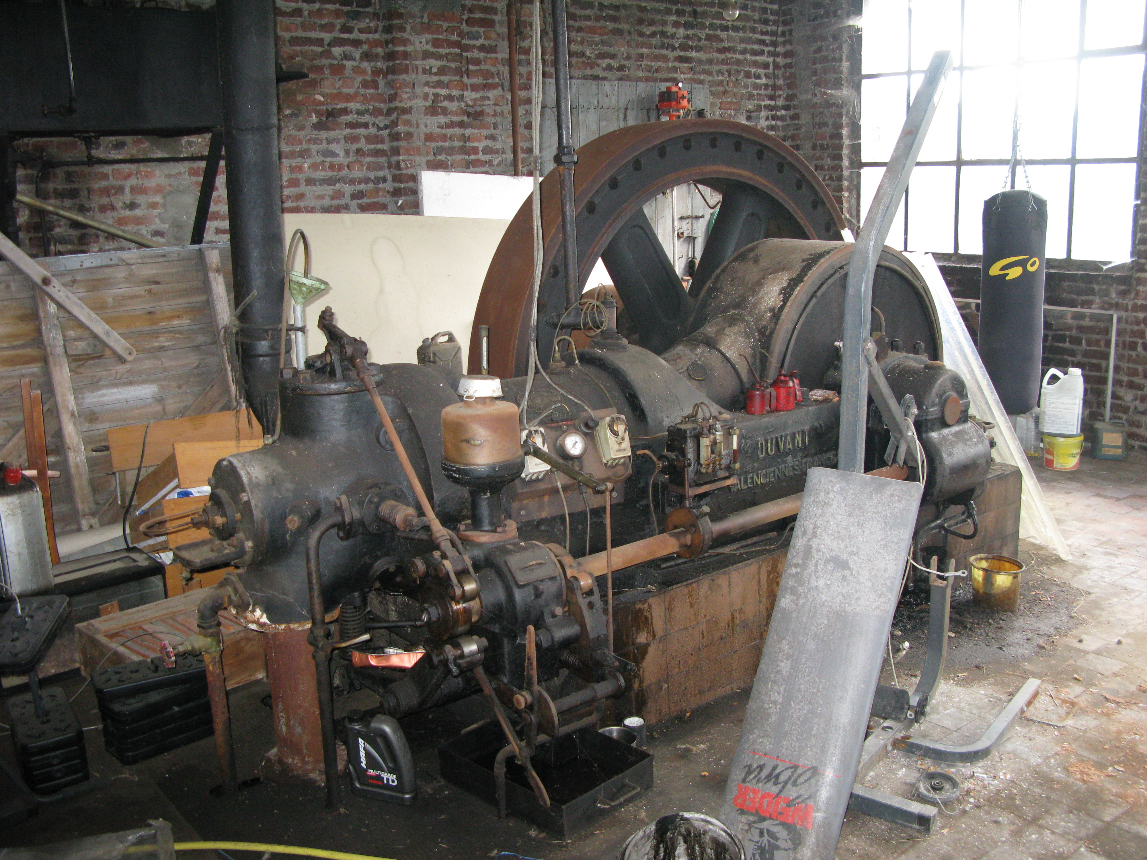 Moteur Duvant de la minoterie Chevalier, vue de la cour, à Coppenaxfort.